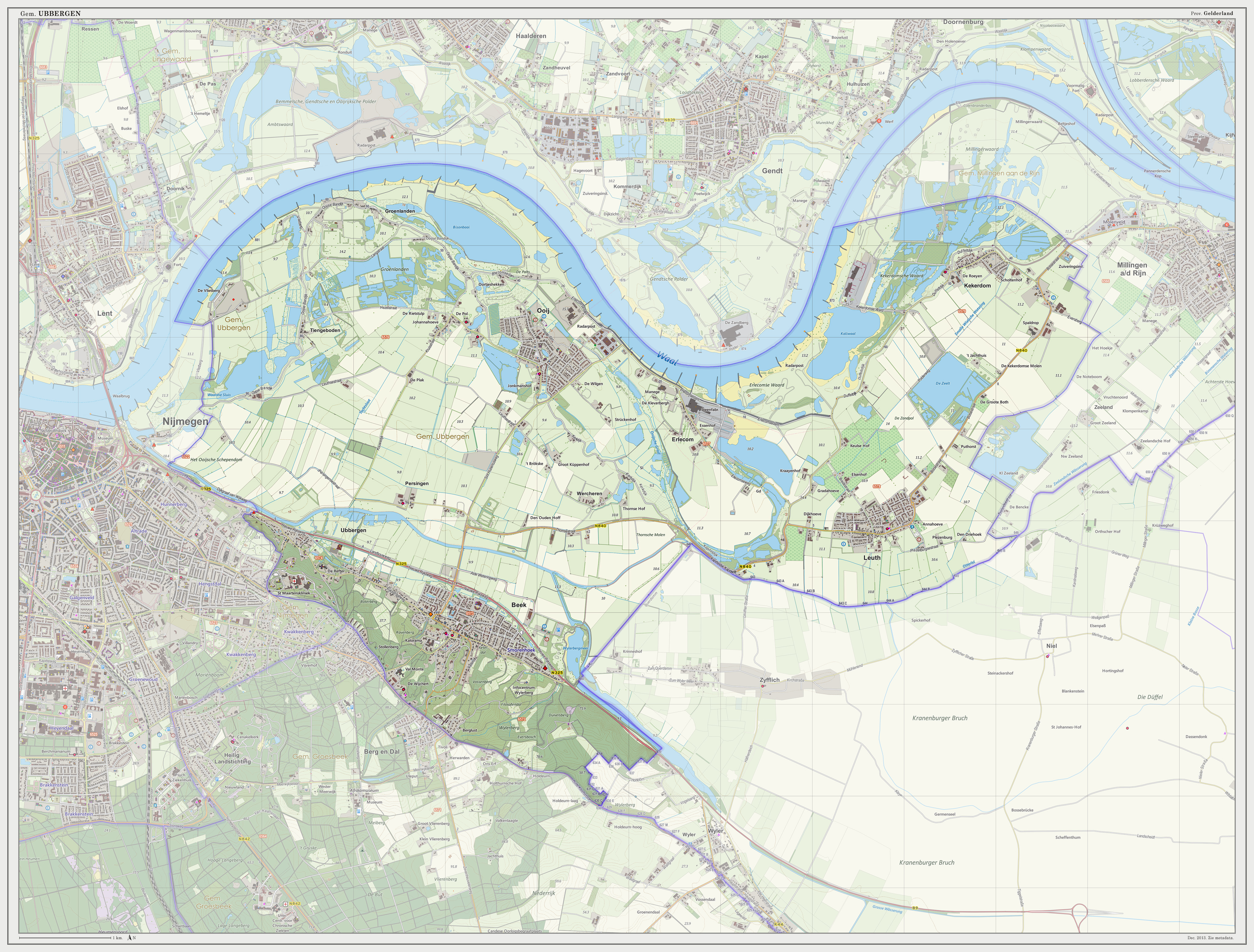 Topografische gemeentekaart. Resolutie: 300 pixels/km. Kaartbeeld samengesteld met de open geodata van de Top10NL en Top25namen (Basisregistratie Topografie, Kadaster 30-nov-2013), o.b.v. Creative Commons BY licentie. Gebouwvlakken uit Open Geodata BAG extract (8-dec-2013). Wegen uit de OpenStreetMap (15-dec-2013). Samenstelling en kleurenschema: Jan-Willem van Aalst, met QGIS2 en Adobe Photoshop. Zie ook de Legenda.